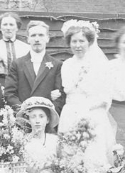 David Cornelis van Schaïk op zijn dag van trouwen met Margareta Wilhelmina Johanna Louise Wijting in 1914